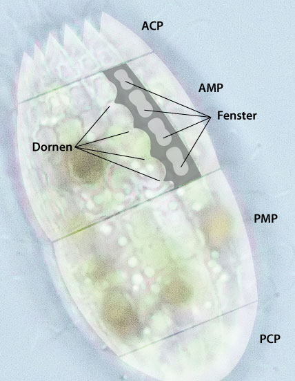 Coleps mit Beschriftung der Panzergürtel